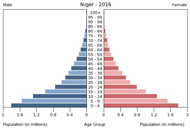 A population pyramid illustrates the age and sex structure of a country's population and may provide insights about political and social stability, as well as economic development. The population is distributed along the horizontal axis, with males shown on the left and females on the right. The male and female populations are broken down into 5-year age groups represented as horizontal bars along the vertical axis, with the youngest age groups at the bottom and the oldest at the top. The shape of the population pyramid gradually evolves over time based on fertility, mortality, and international migration trends.